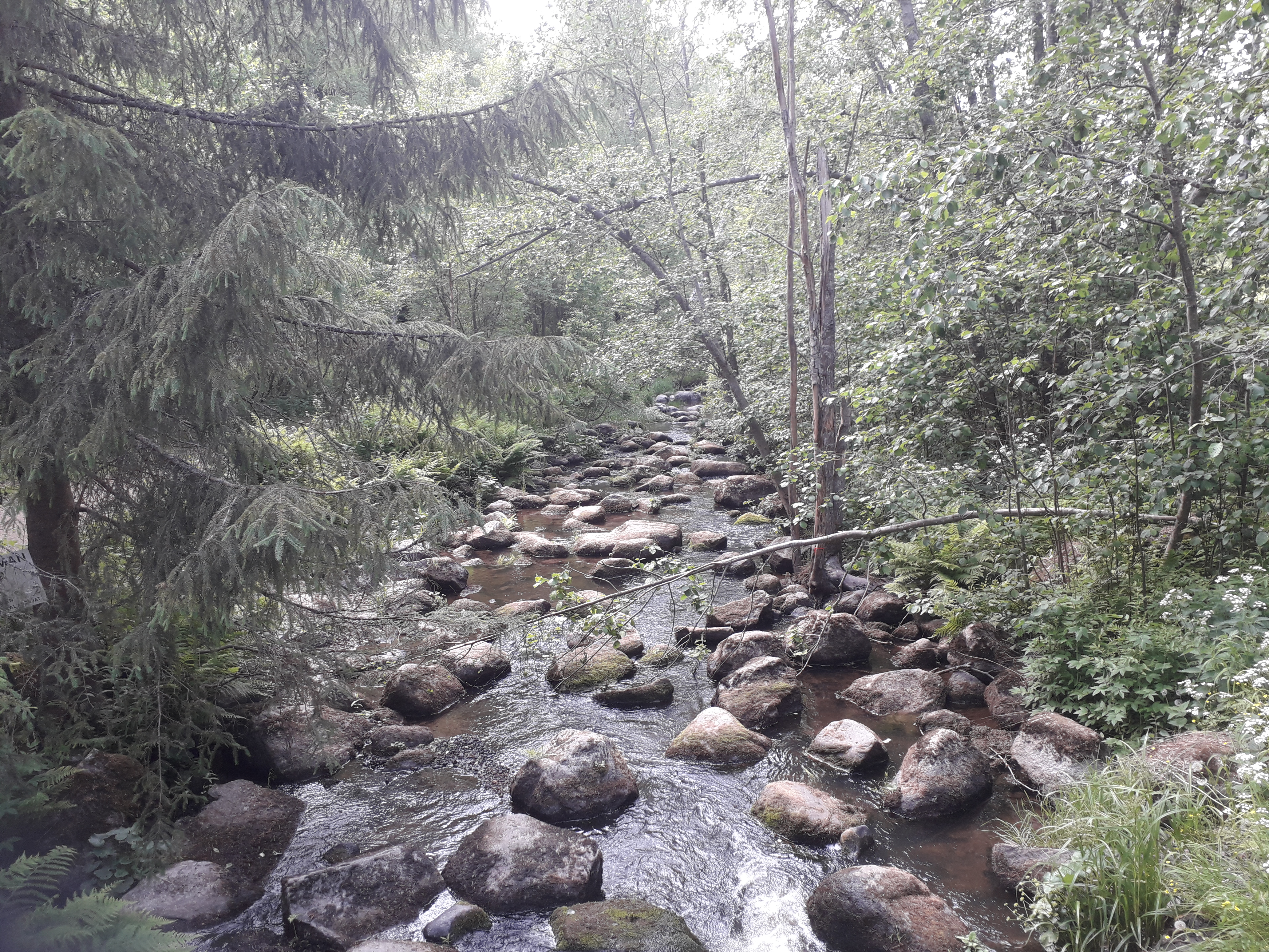 Luontoa Vantaanjoen Käräjäkoskella, Riihimäellä.